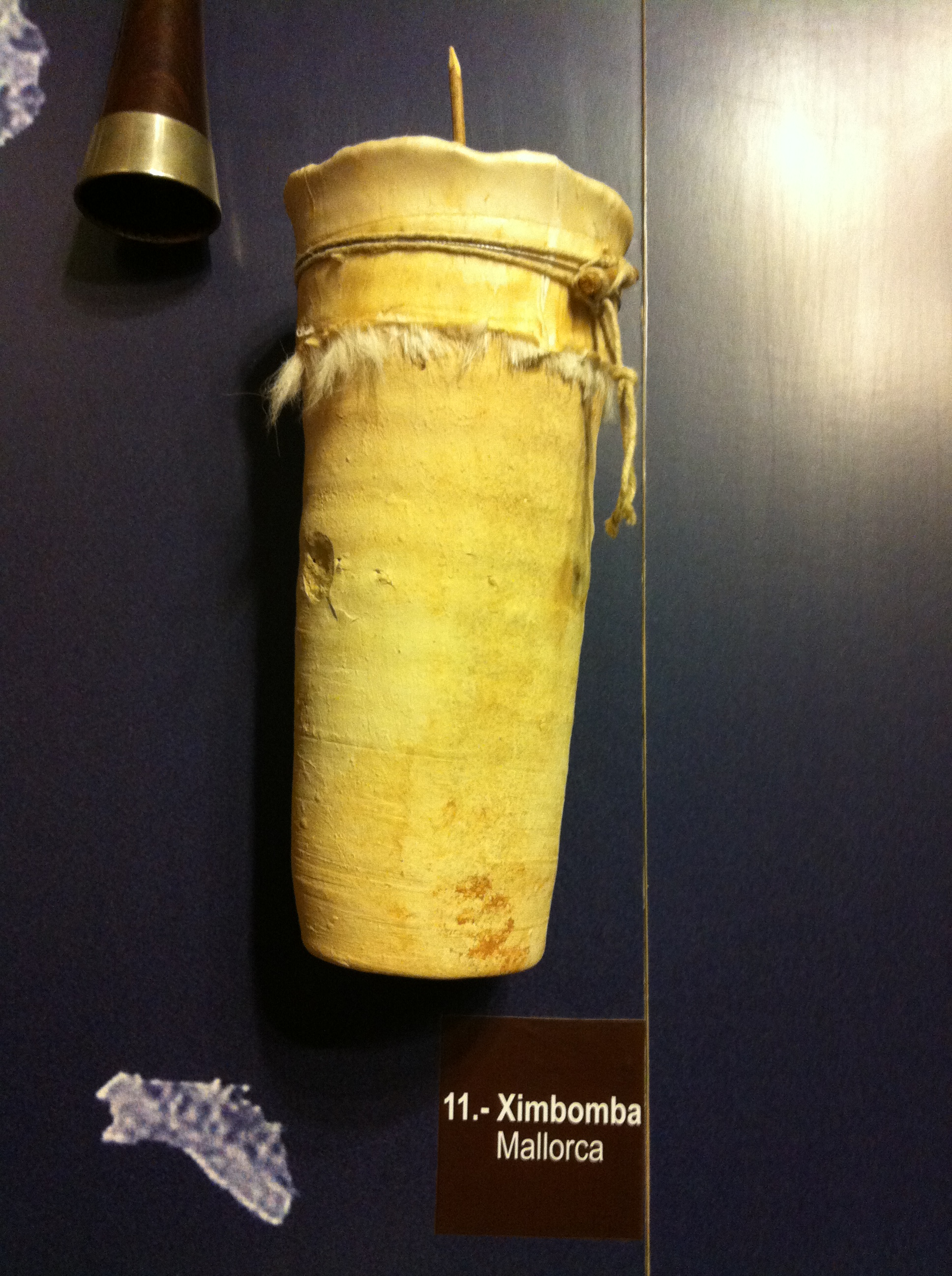 Museu de la Mediterrània de Torroella de Montgrí